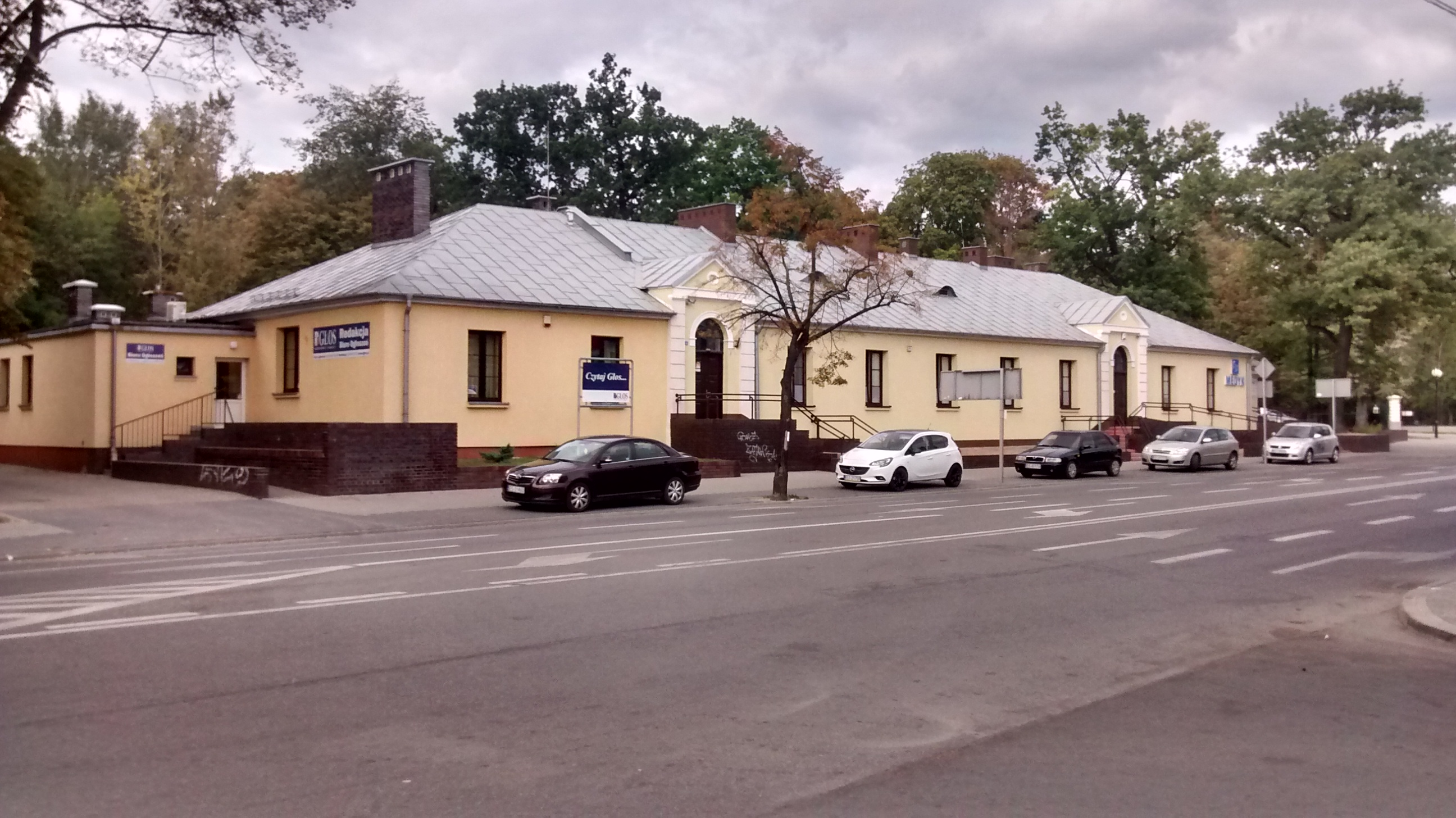 Budynek dawnego szpitala. Obecnie prywatne ośrodki zdrowia i siedziba gazety Głos Skierniewic